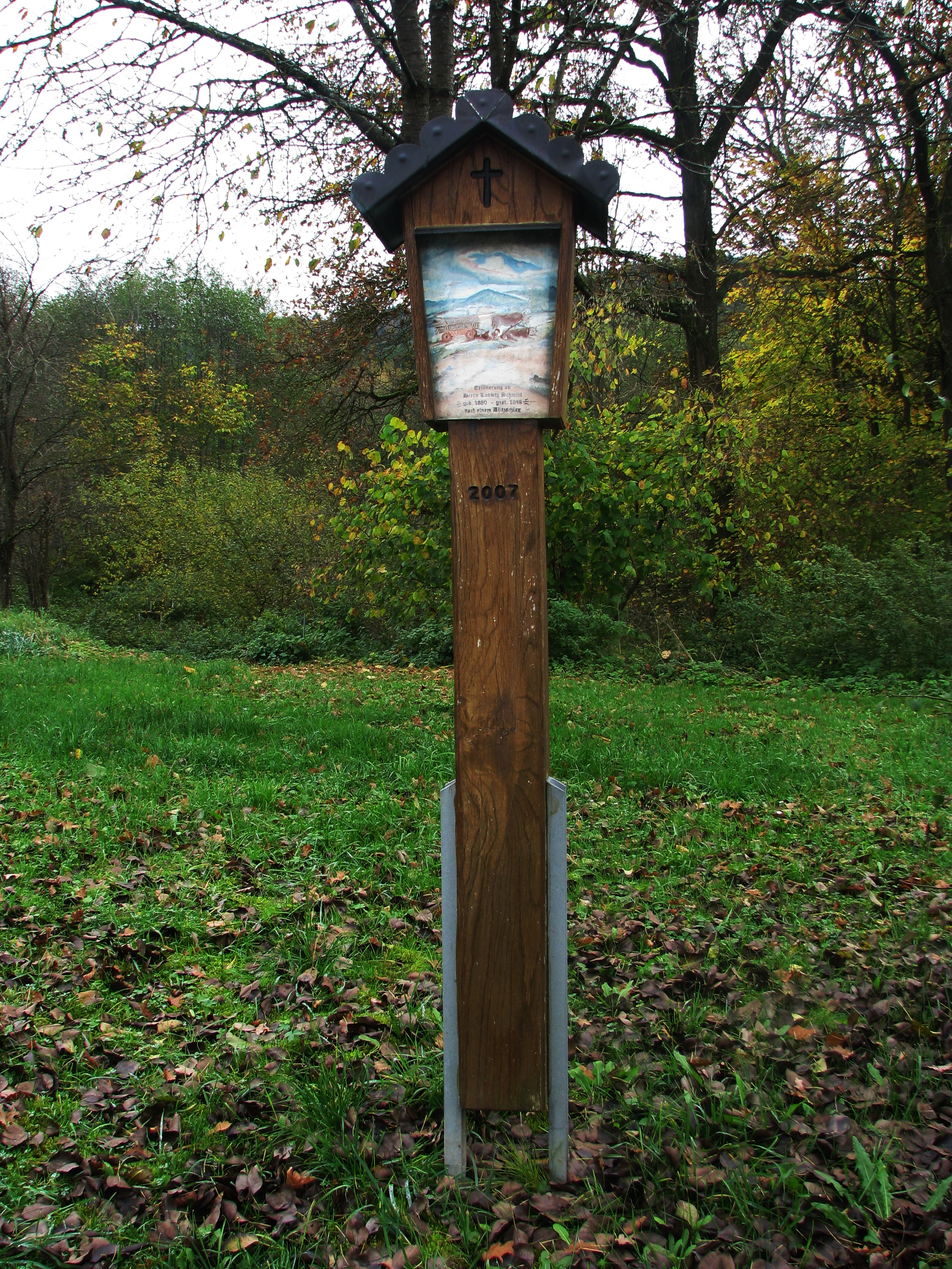 Unterrohrenstadt, Ortsteil der Gemeinde Berg bei Neumarkt in der Oberpfalz, Marterl